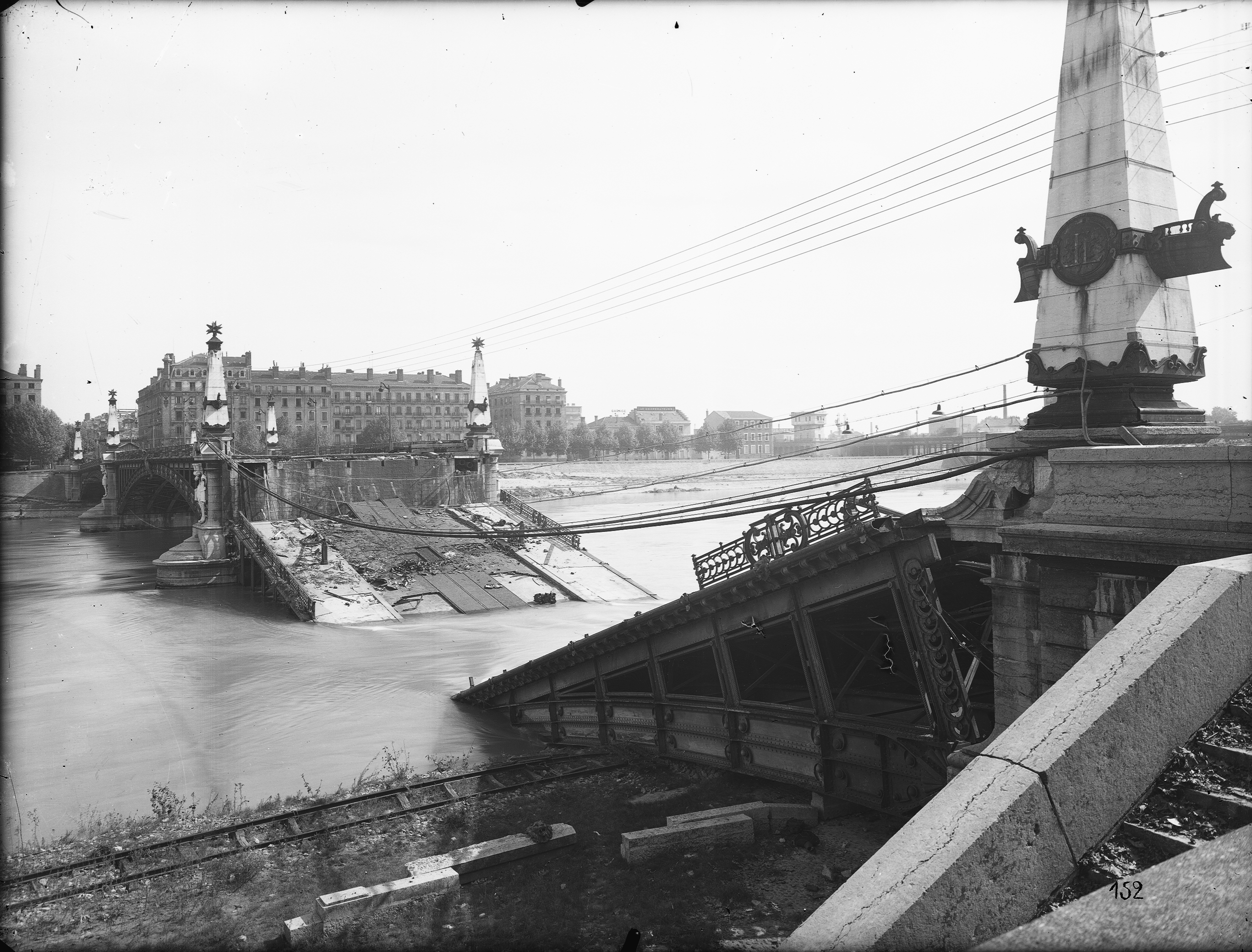 Destruction du pont Galliéni